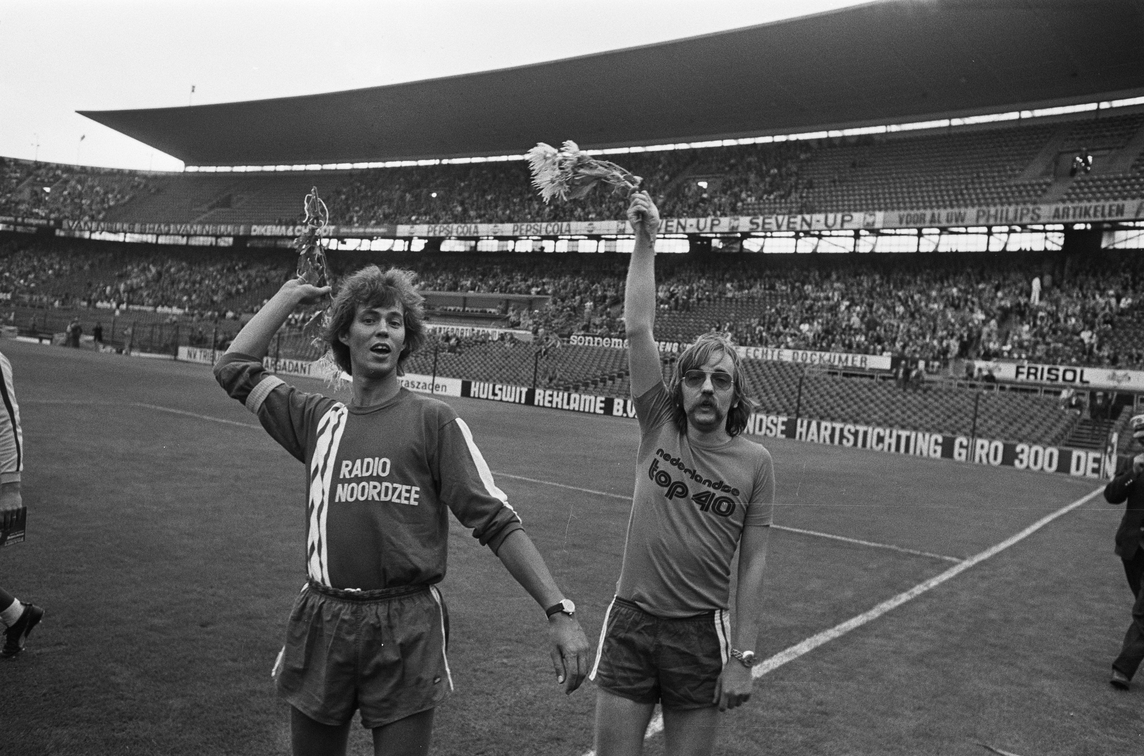 Voetbalteams van Radio Veronica en van Radio Noordzee spelen een vriendschappelijke wedstrijd. Op de foto: Tony Berk (l) van Noordzee en Lex Harding (r) van Veronica. 1 september 1974 (dag na einde van deze radiozenders). Feijenoord Stadion, Rotterdam. Uitslag: 3-3